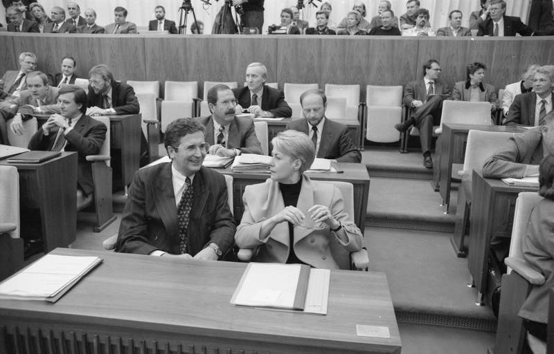 Bonn, 1. Dezember 1989 Bundesratssitzung, Die Mitglieder des Bundesrates gedenken des am 30. November 1989 von Terroristen ermordeten Vorstandssprechers der Deutschen Bank, Dr. Alfred Herrhausen.